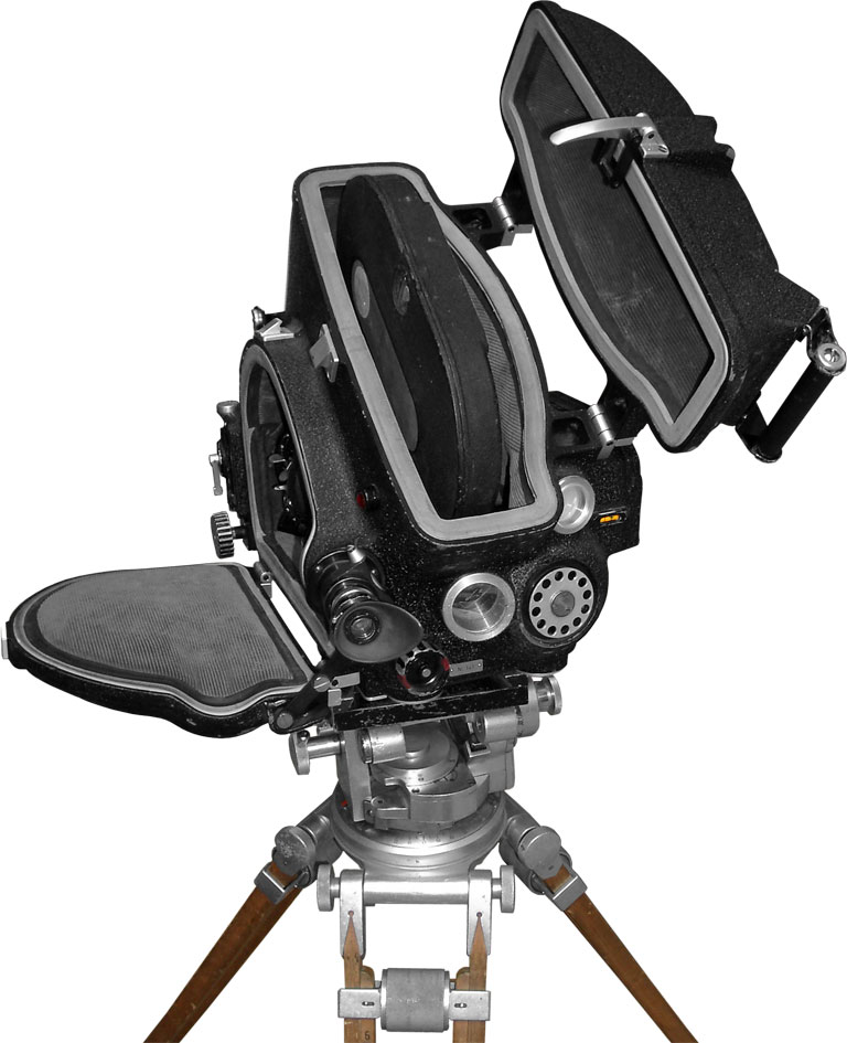 GNU-FDL, selbst fotografiert